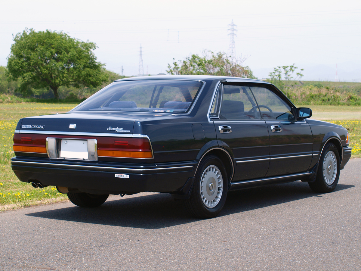 日産セドリックY31型・V20ツインカムターボブロアム 前期型ダークブルー